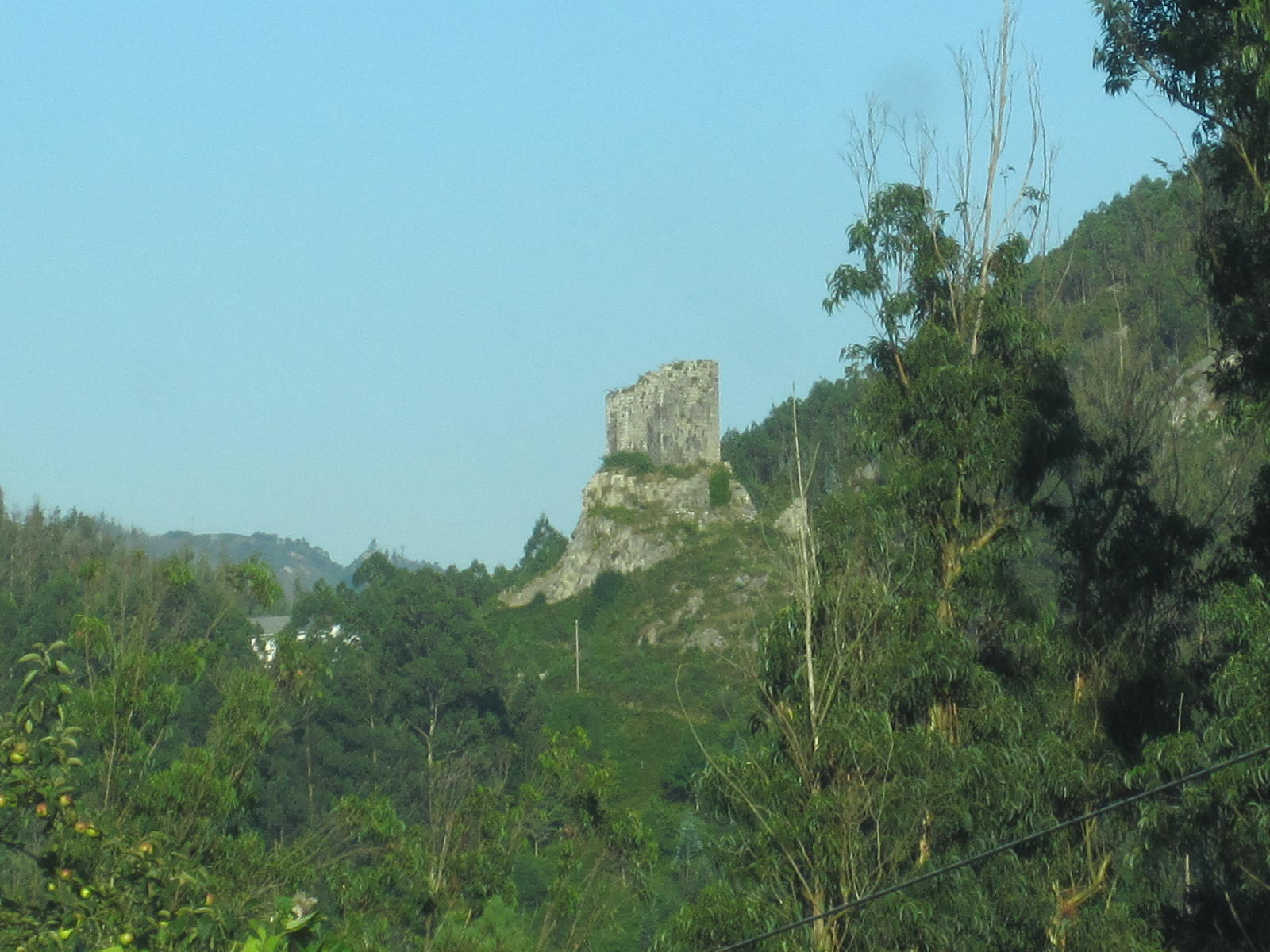 Xubia - Castro This is a photography of a Special Area of Conservation in Spain with the ID: ES1110013. Natura2000 entry, EEA entry